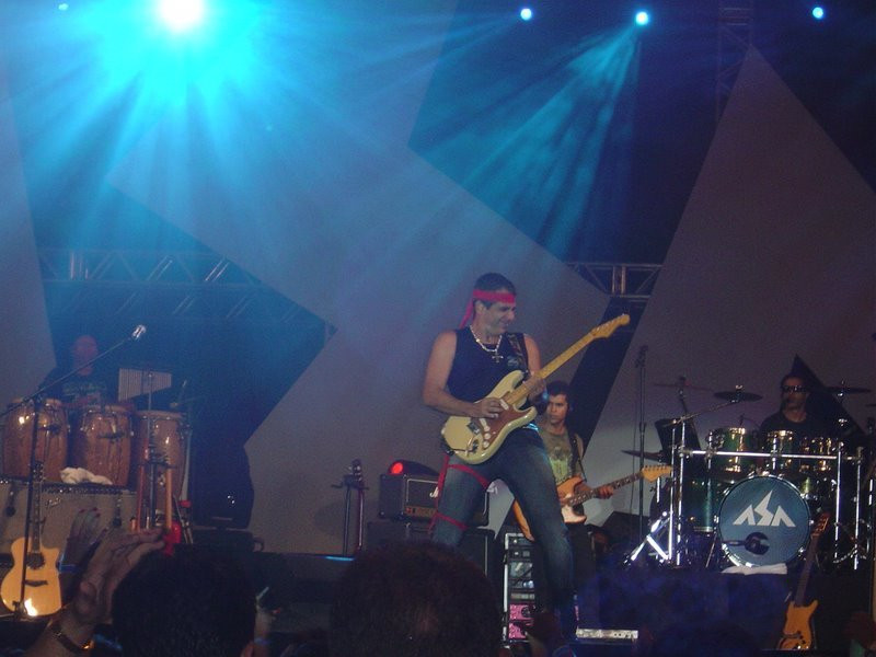 Durval Lelis